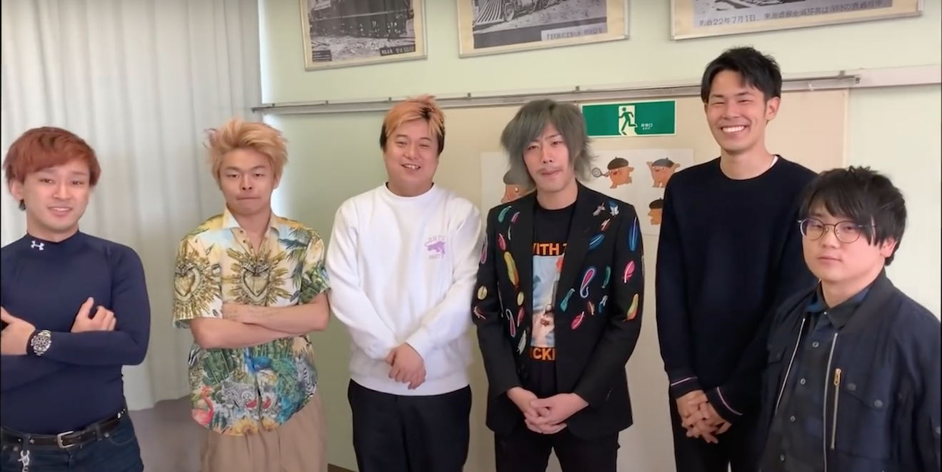 YouTuberの東海オンエア。原典動画の2:06より。